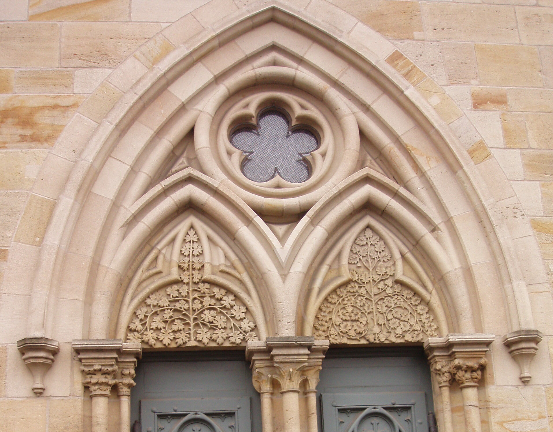 Schmuck über einem Seiteneingang von St. Dionys in Esslingen